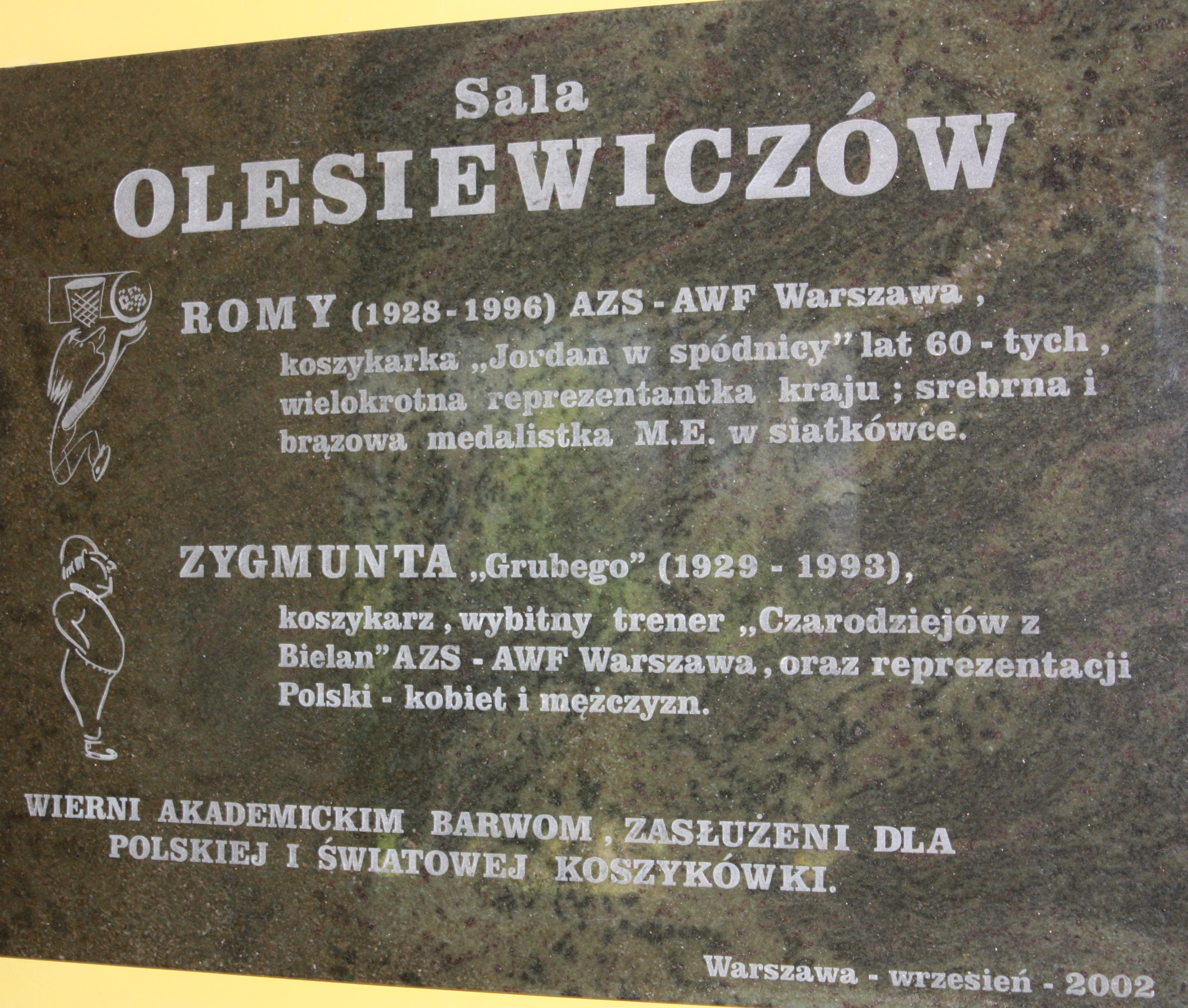 Tablica na sali gimnastycznej w budynku Zespołu Szkół nr 55 im. gen Stanisława Maczka przy ul. Gwiaździstej 35 w Warszawie